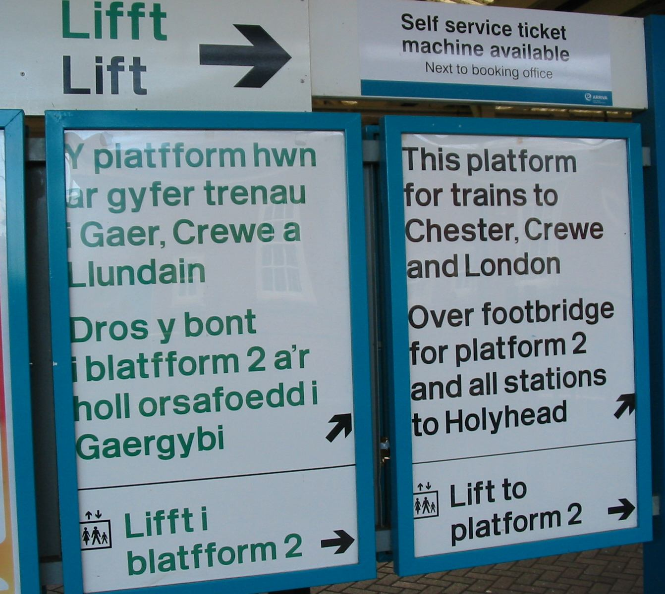 Seinale elebiduna Bangor hiriko trengeltokian: galesera eta ingeleraz.